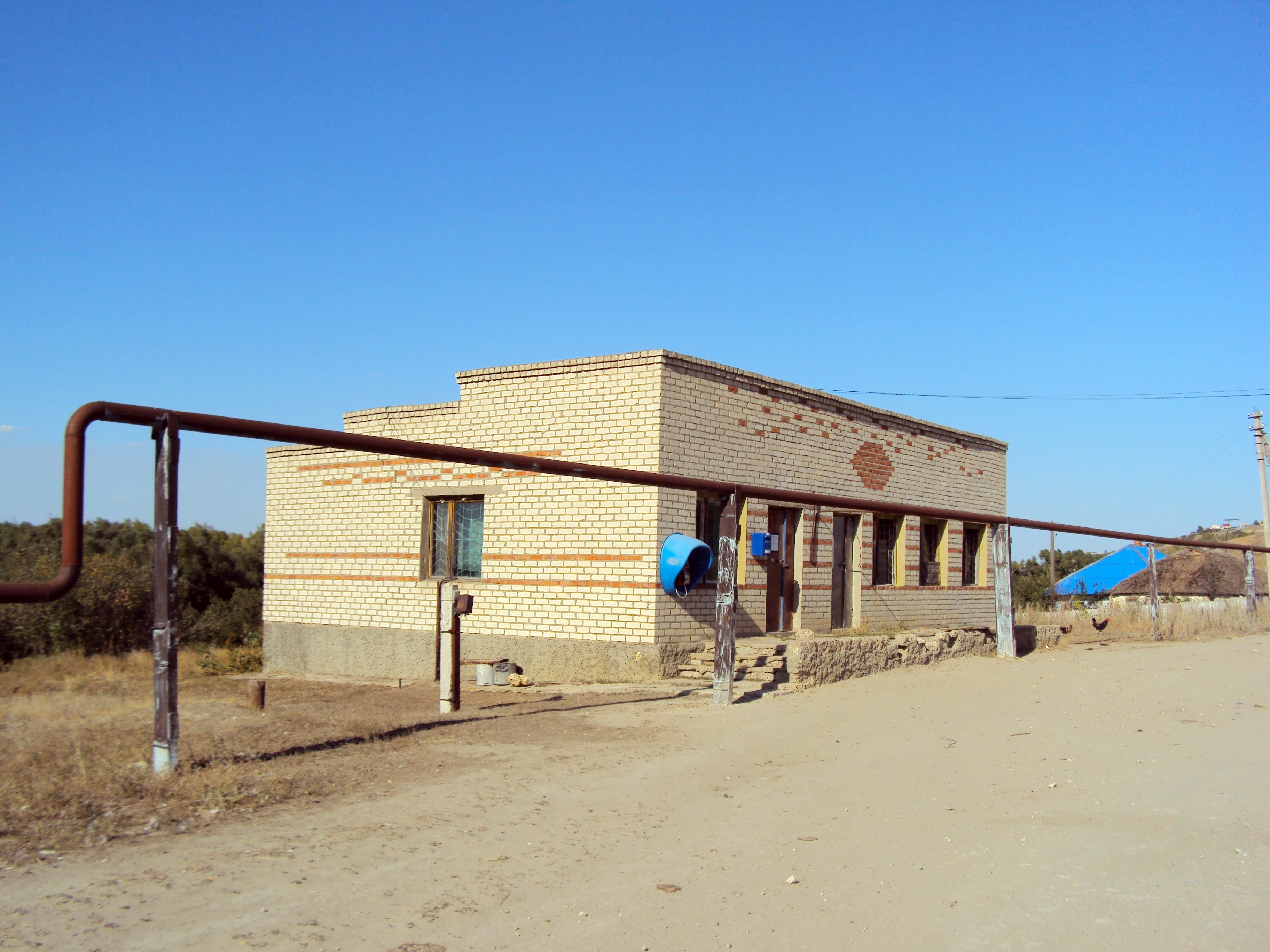 Почта на хуторе Затонский.